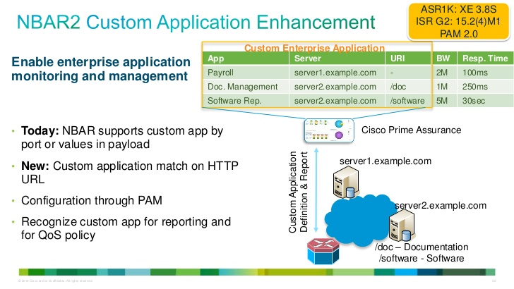 Монгол: Рутер дээр NBAR протоколыг тохируулахад дээрх зурган дээр харагдах зурвасын өргөн, хэрэглэгдэж байгаа аппликейшнийг серверийн хаяг эсвэл домайн нэрийн хамт харуулна.